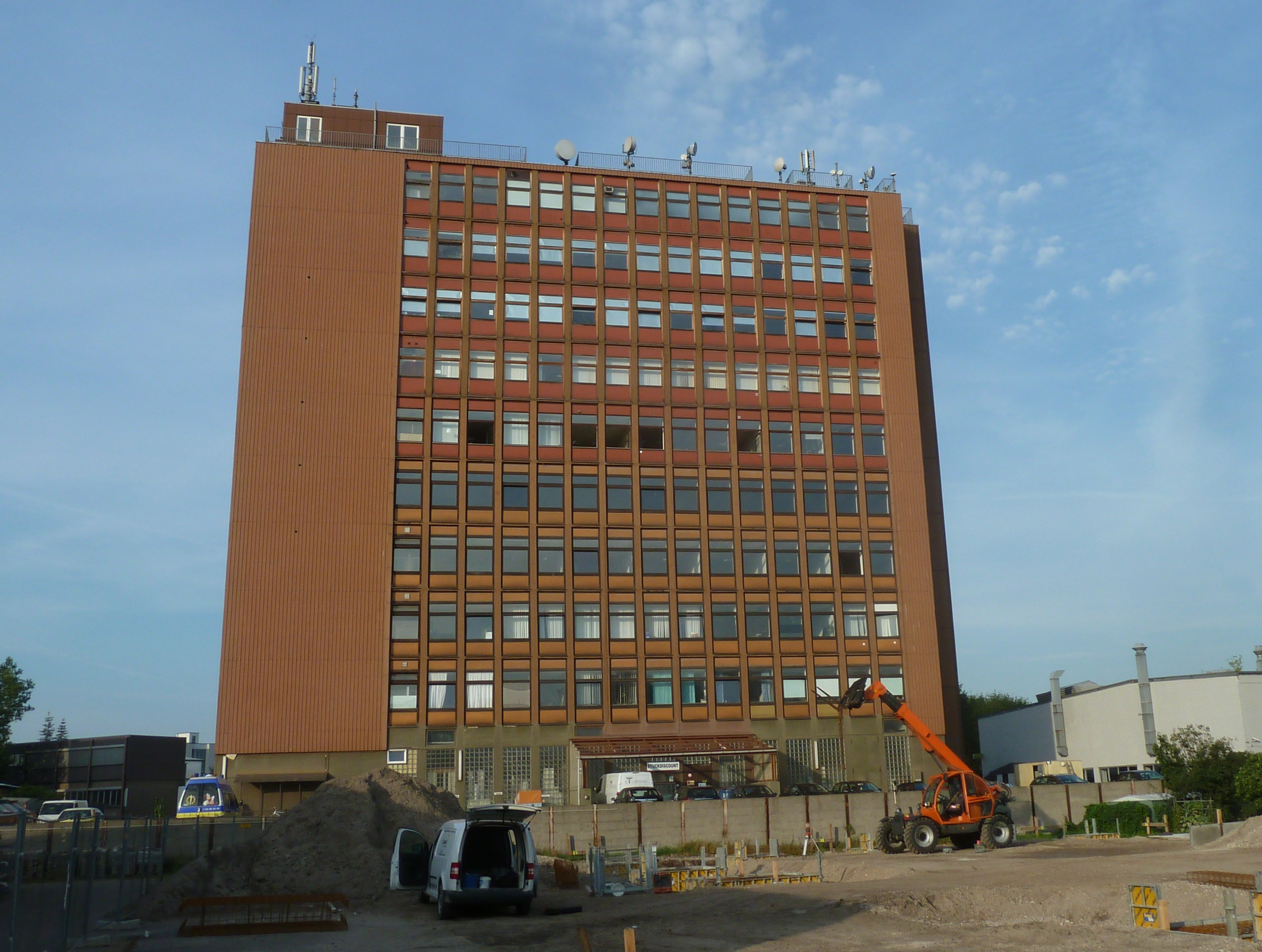 "Hühnerhochhaus" Boschweg 13, Berlin-Neukölln